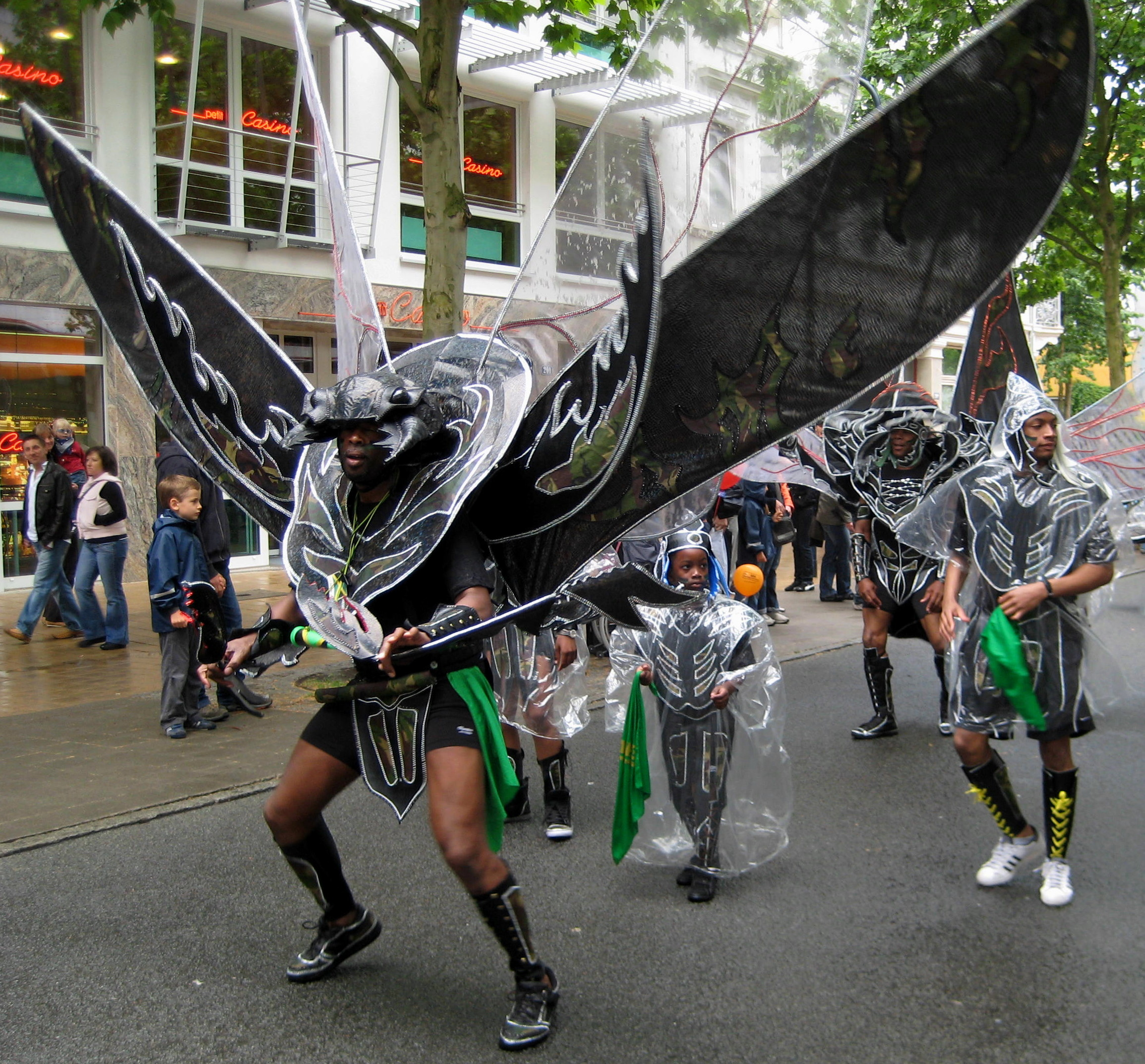 Spaßparade der Altonale in Hamburg 2008